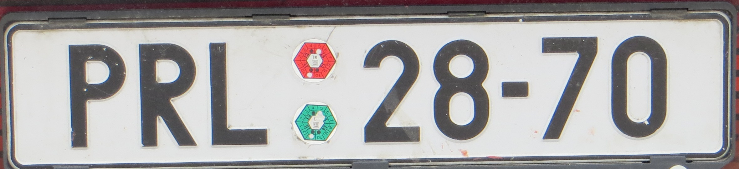 Tsjechische plaat oud